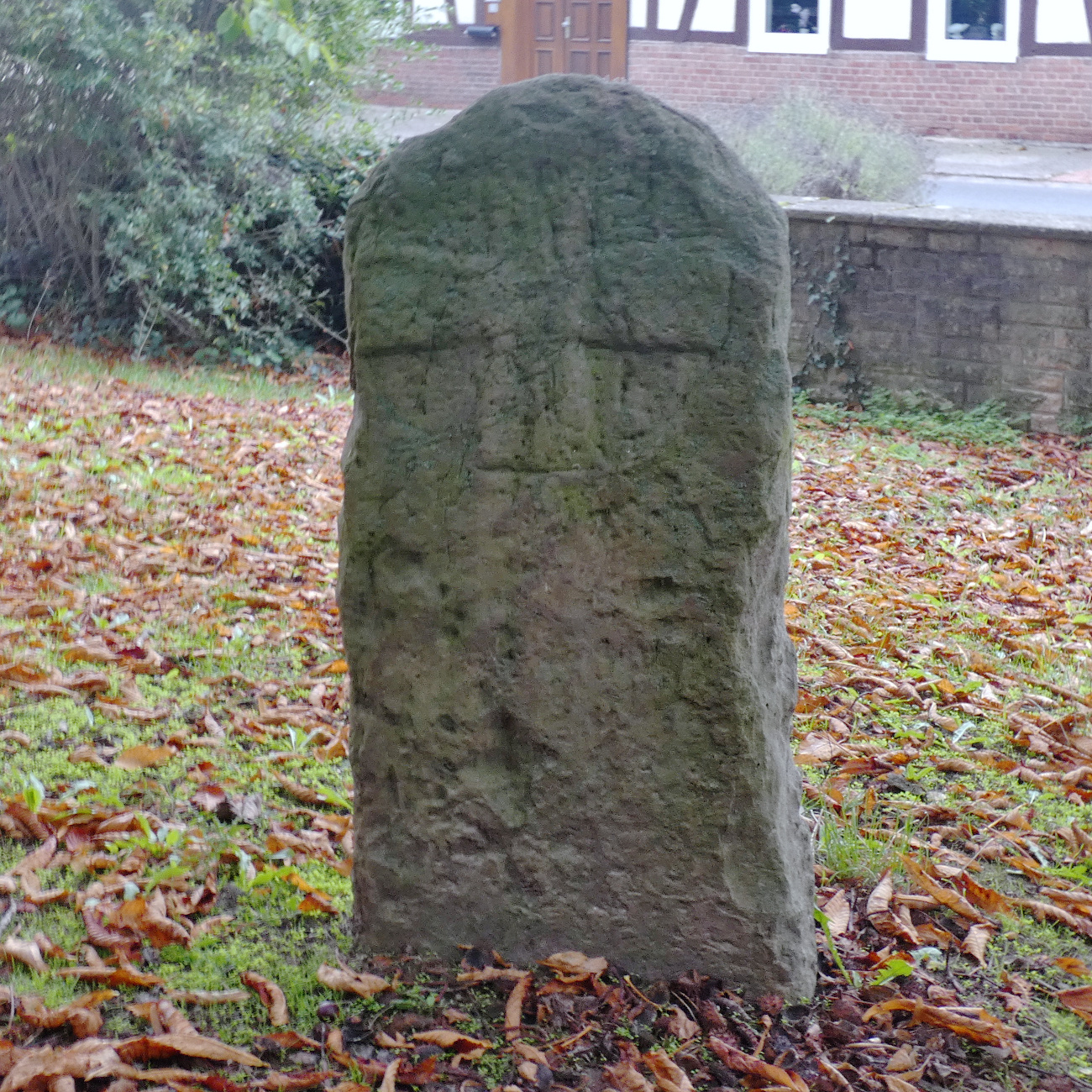 Die Kreuzsteine, oder früher die 5 Steine, sind eine Gruppe von Kreuzsteinen in Hiddestorf, einem Stadtteil von Hemmingen in der Region Hannover in Niedersachsen